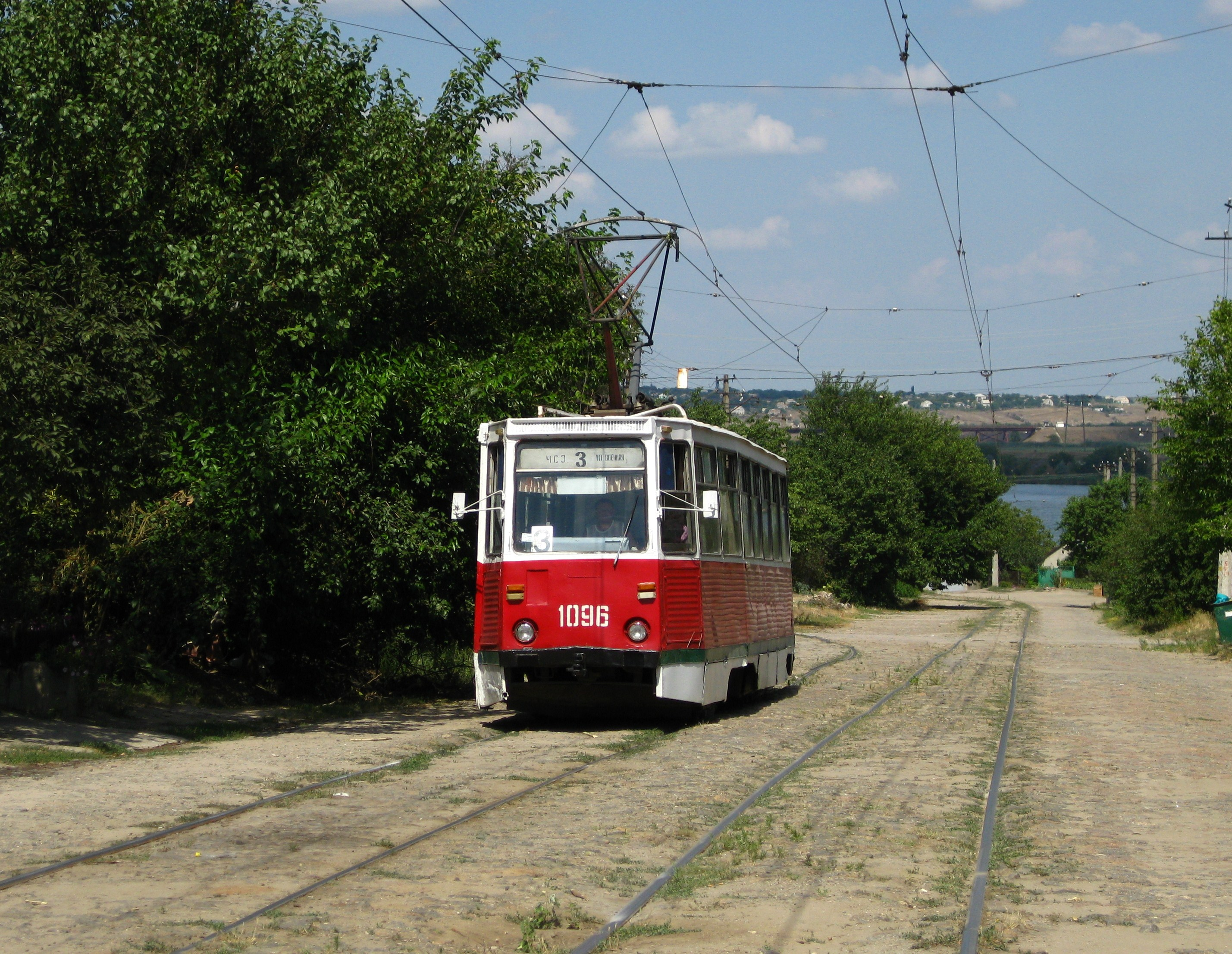 Трамвайный вагон 71-605 в Николаеве